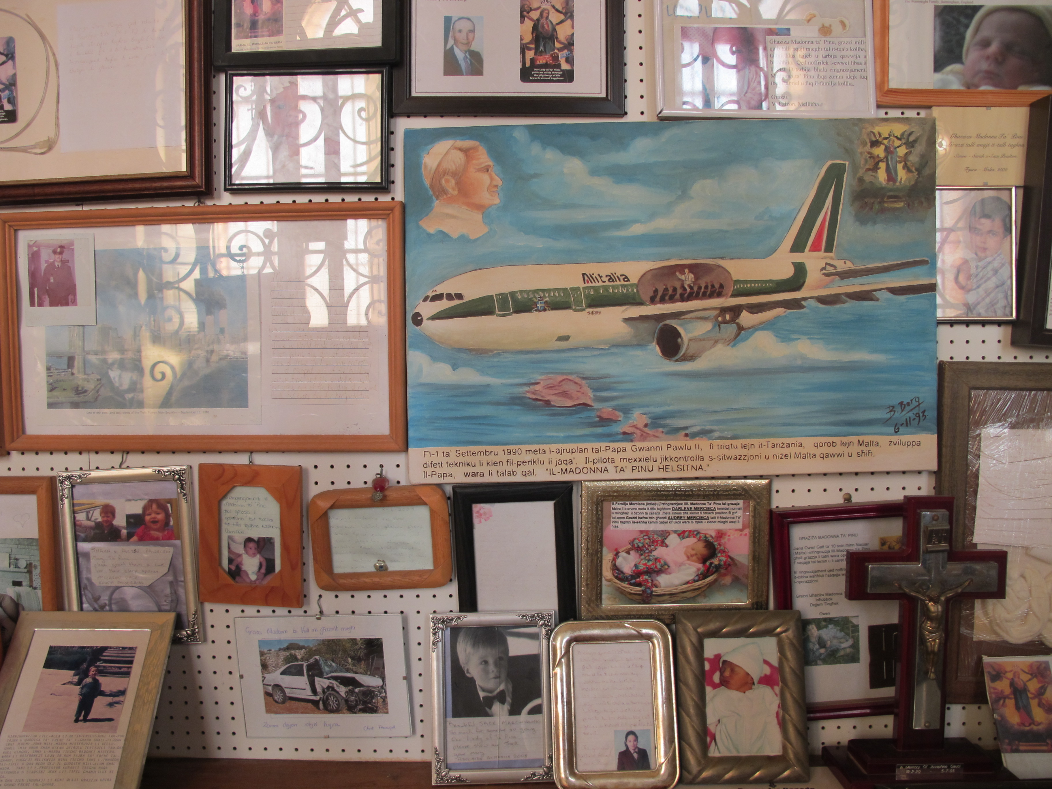 Dankesbezeugungen in der Wallfahrtskriche Ta' Pinu Nov 2014